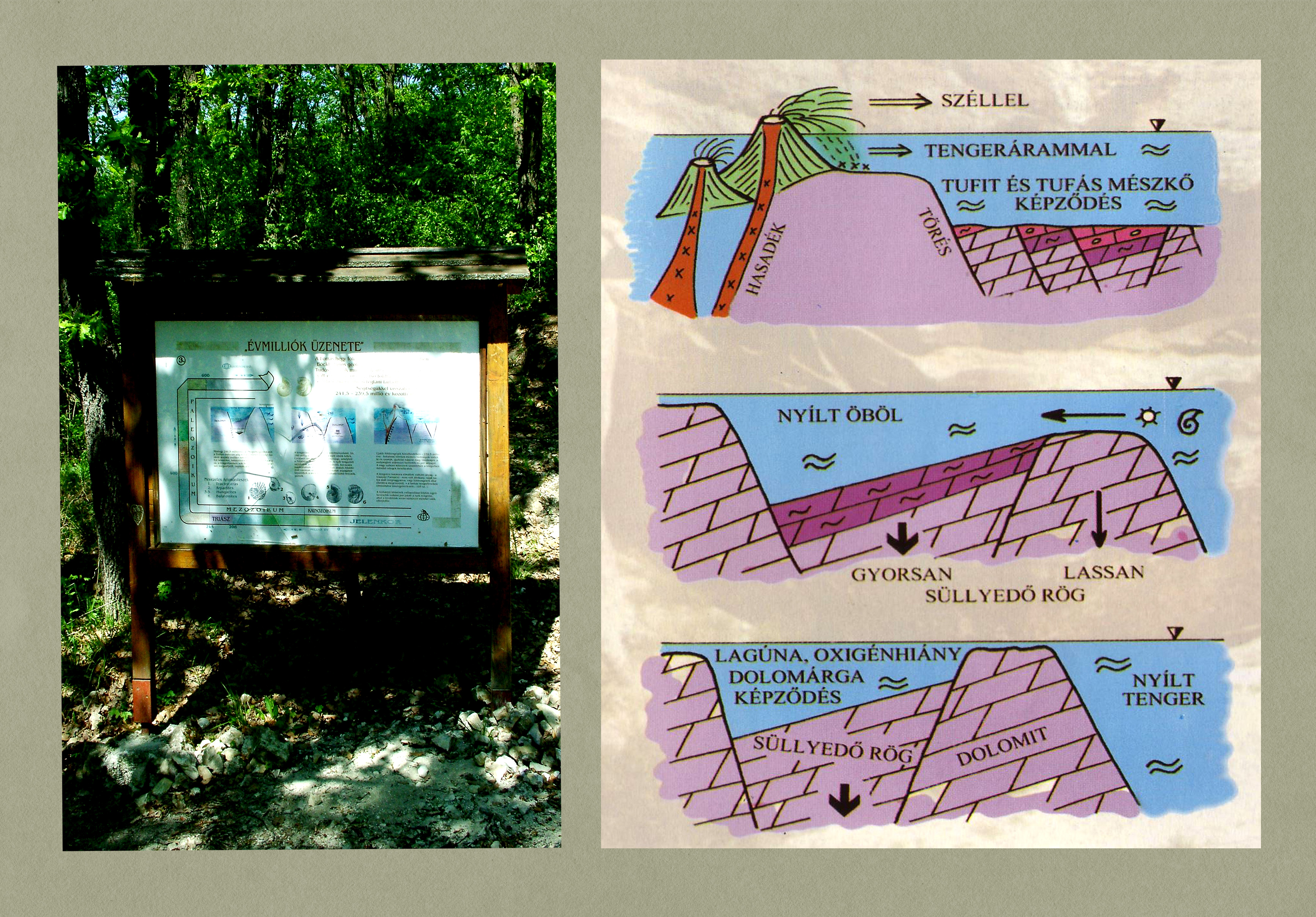 Felsőörsi Forrás-hegyi geológiai bemutatóhely